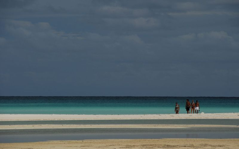 Cayo Largo, augustus 2006, info in de Metadata